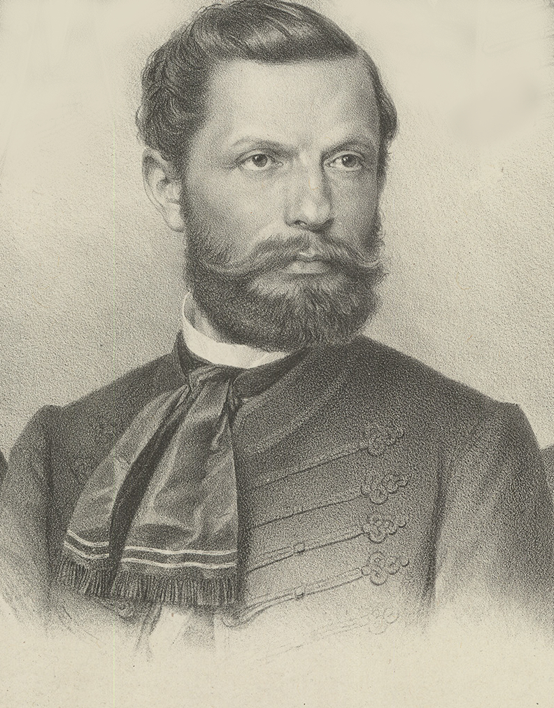 Konek Sándor (Pest, 1819. augusztus 18. – Balatonfüred, 1882. augusztus 1.) statisztikus, jogtudós, a Magyar Tudományos Akadémia rendes tagja. Az államtudománytól a 19. század során elkülönülő statisztika úttörő alakja volt, munkásságával jelentősen hozzájárult a hazai statisztika elméleti alapjainak megteremtésében.